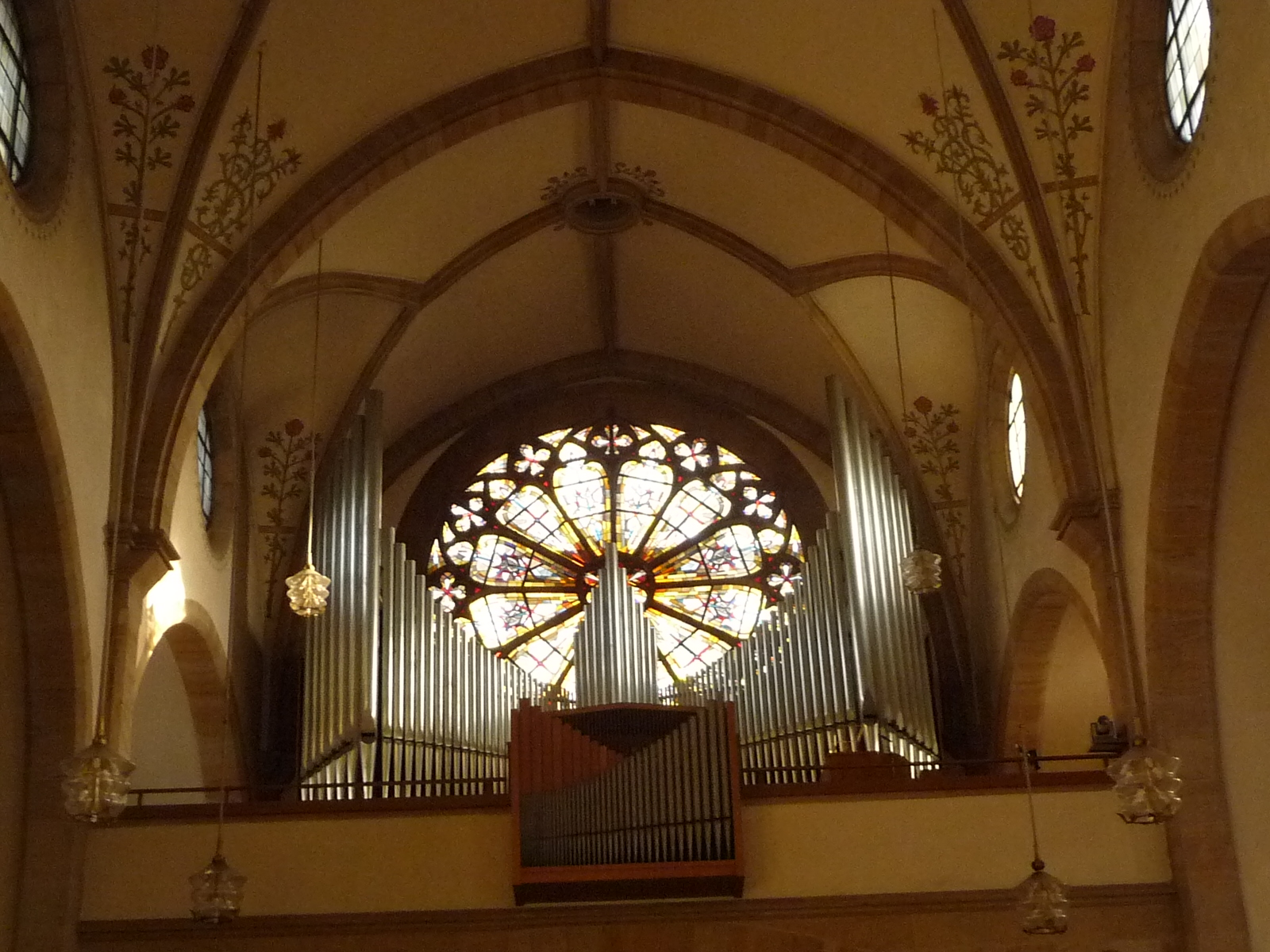 St. Peter und Paul in Geinsheim (Neustadt an der Weinstraße)